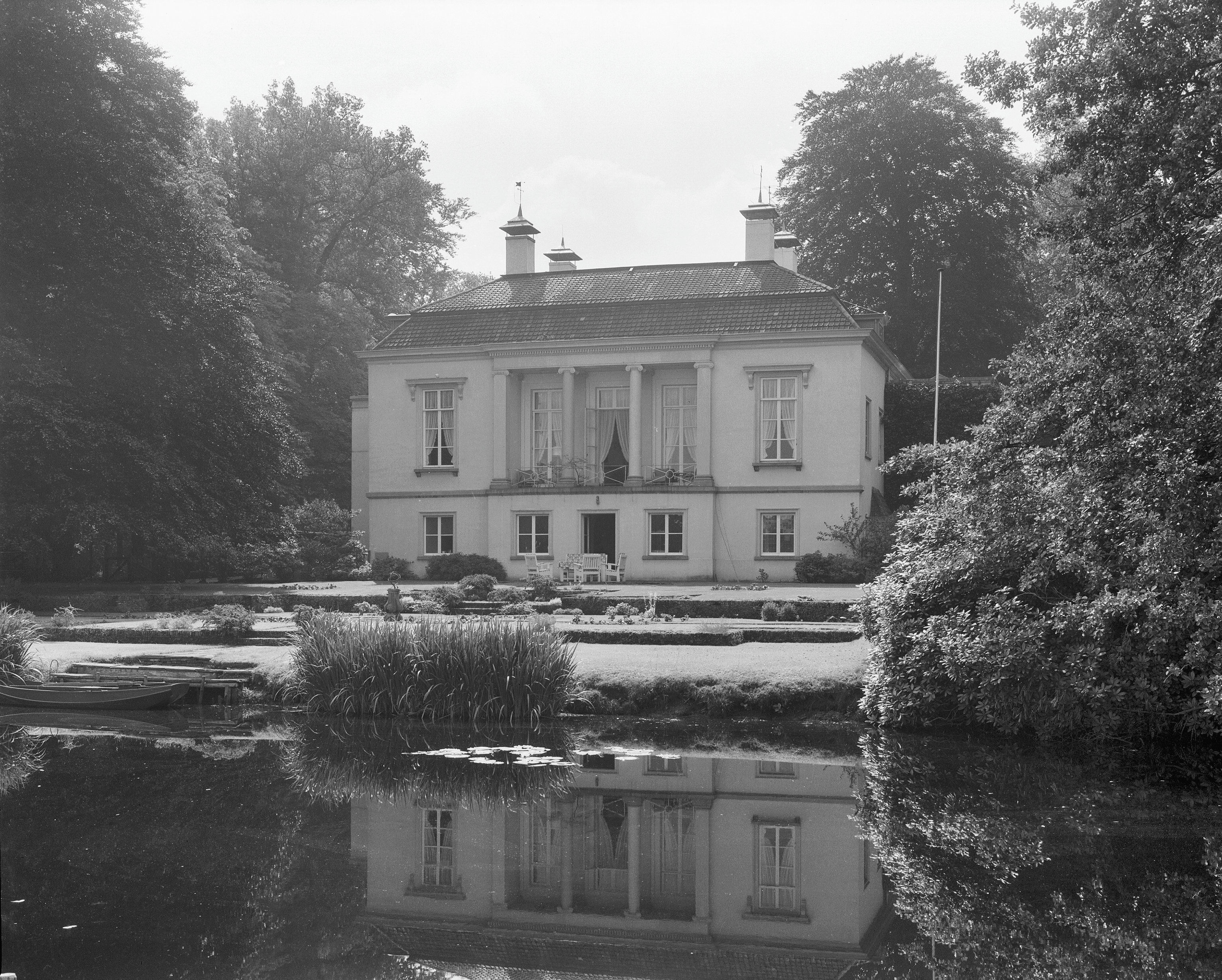 Ewijckshoeve: Overzicht achterzijde